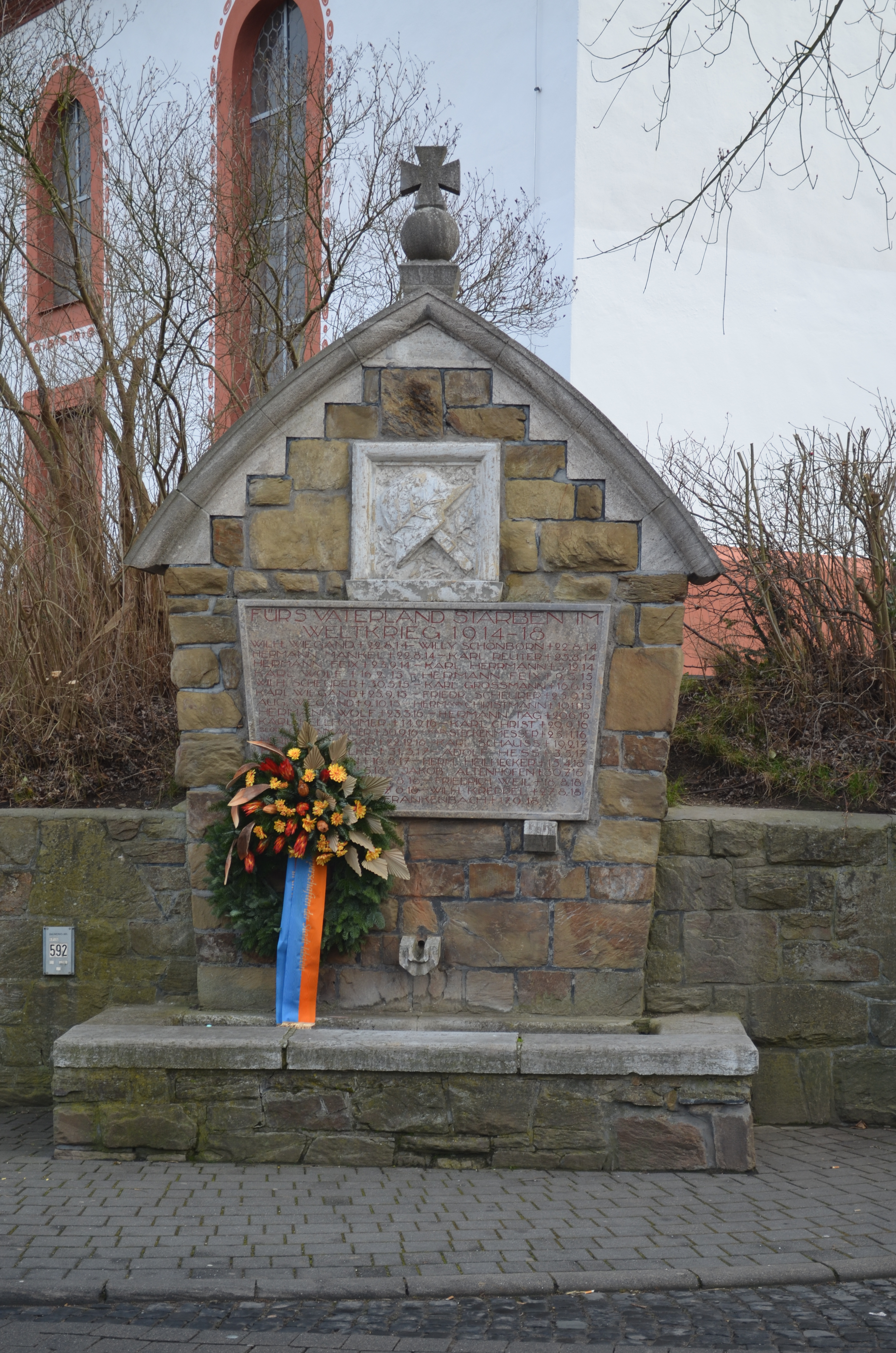 Wörsdorf, Kriegerdenkmal WK I